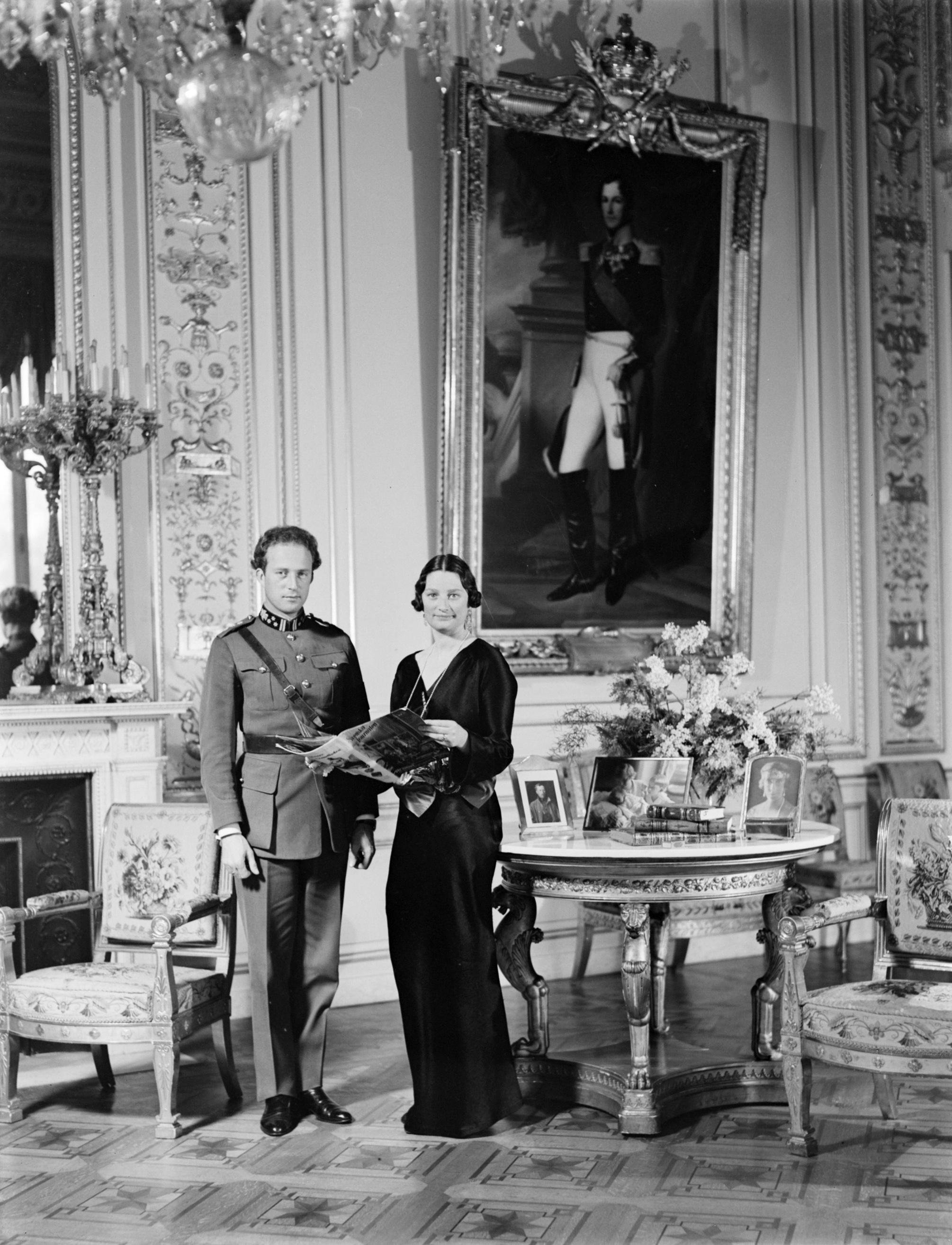 Collectie / Archief : Fotocollectie Van de Poll Reportage / Serie : Koningshuis België Beschrijving : Koning Leopold III en koningin Astrid in het Koninklijk Paleis te Brussel Datum : 1934 Locatie : België, Brussel Trefwoorden : interieurs, koningen, koninginnen, paleizen Persoonsnaam : Astrid (koningin België), Leopold III (koning België) Fotograaf : Poll, Willem van de Auteursrechthebbende : Nationaal Archief Materiaalsoort : Glasnegatief Nummer archiefinventaris : bekijk toegang 2.24.14.02 Bestanddeelnummer : 252-1572